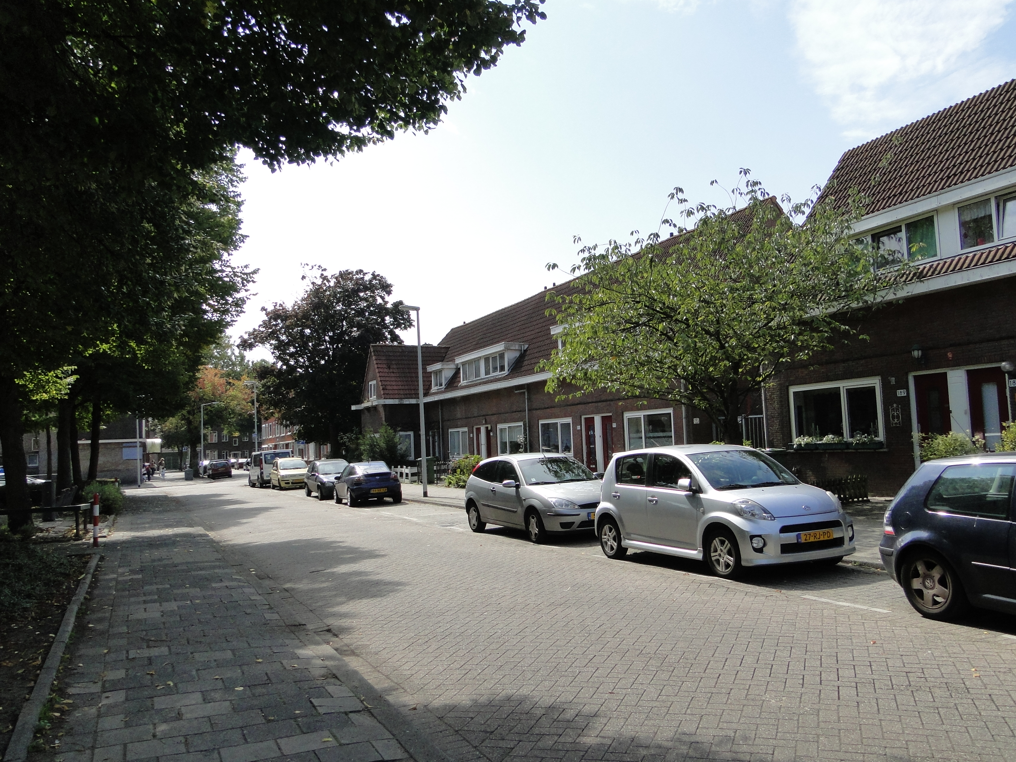 Tarwewijk